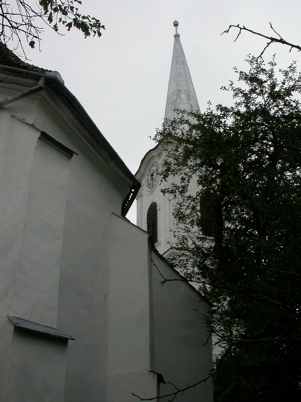 Ansamblul bisericii reformate, sec. XV - înc. sec. XIX